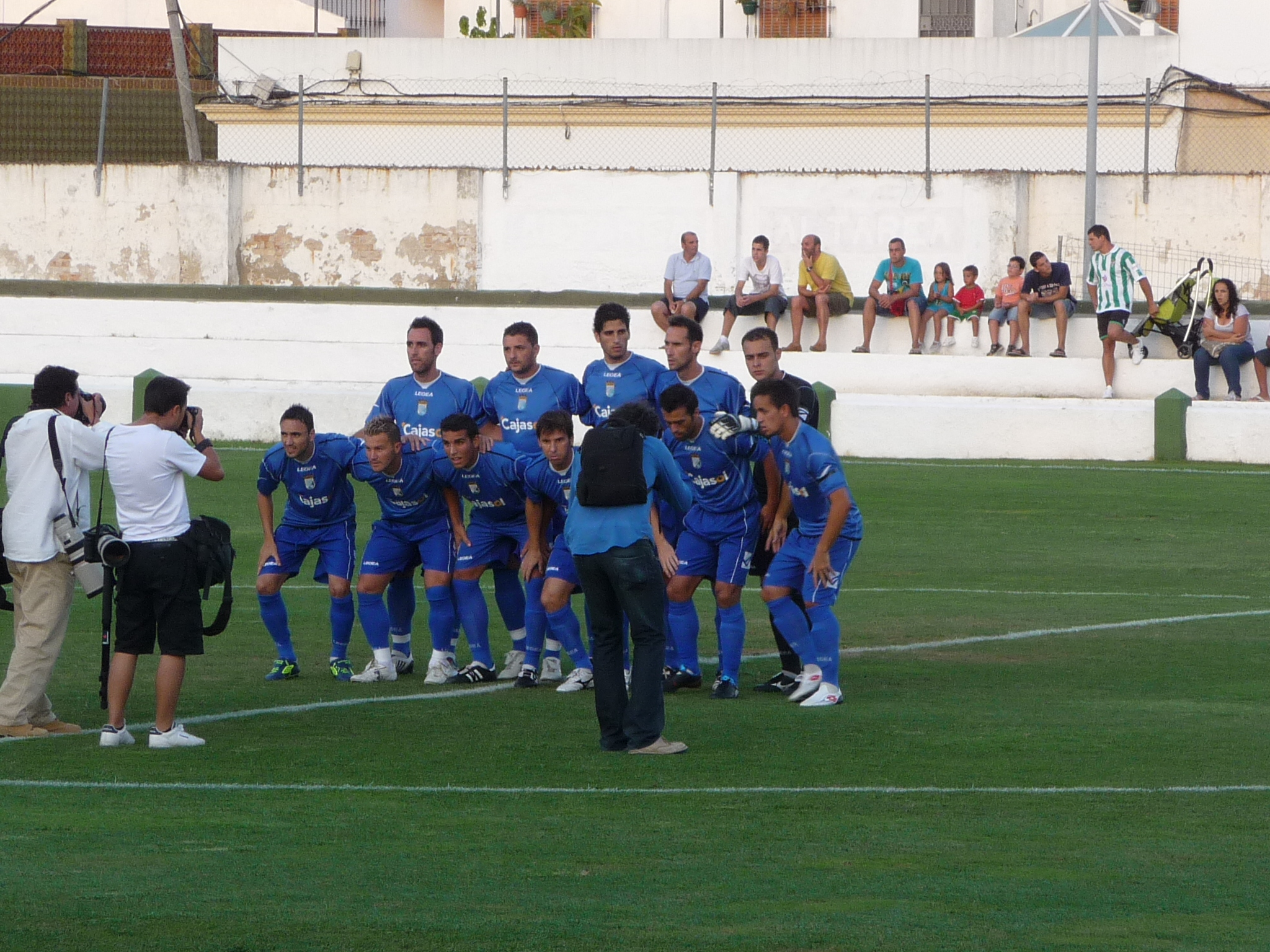 XerezCD-p1040371.jpg